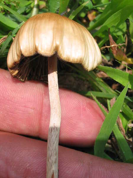 Psilocybe mexicana - Jalisco, Mexico